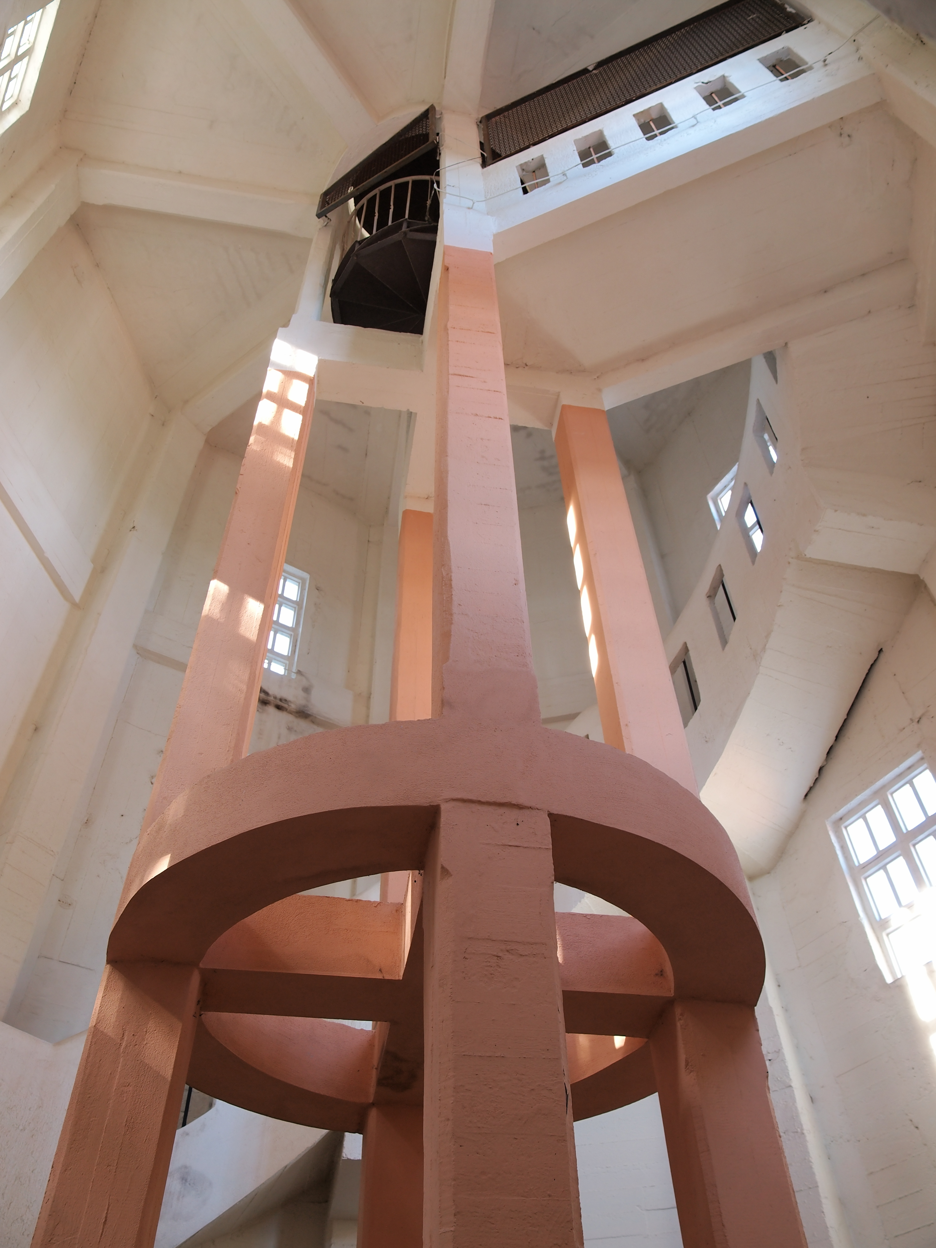 Blick in das Treppenhaus des Wilhelmturm, die Wendeltreppe befindet sich an der Außenwand